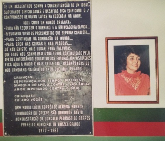 Placa e Retrato de Maria Lúcia